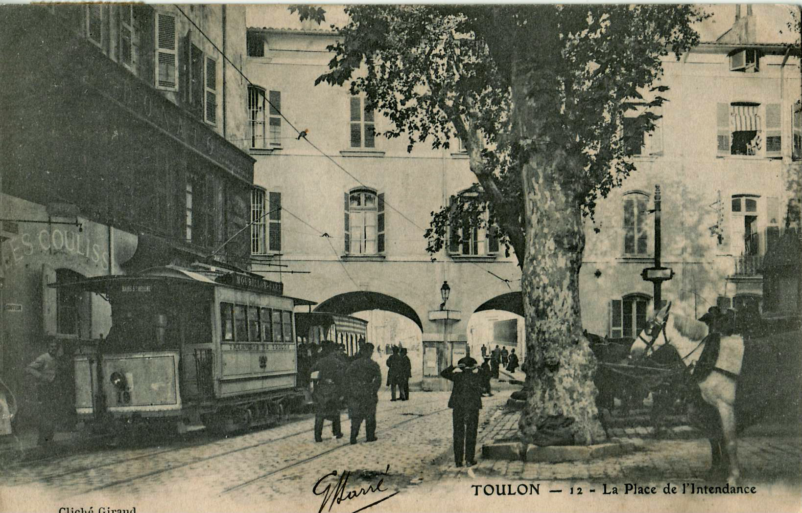 Carte postale ancienne éditée par Girand, n°12 : TOULON - La Place de l'Intendance